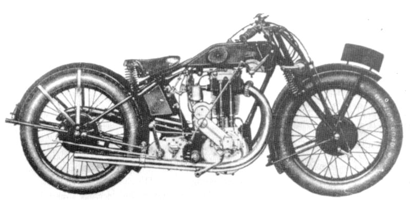 Eng 500 cc Brondoit